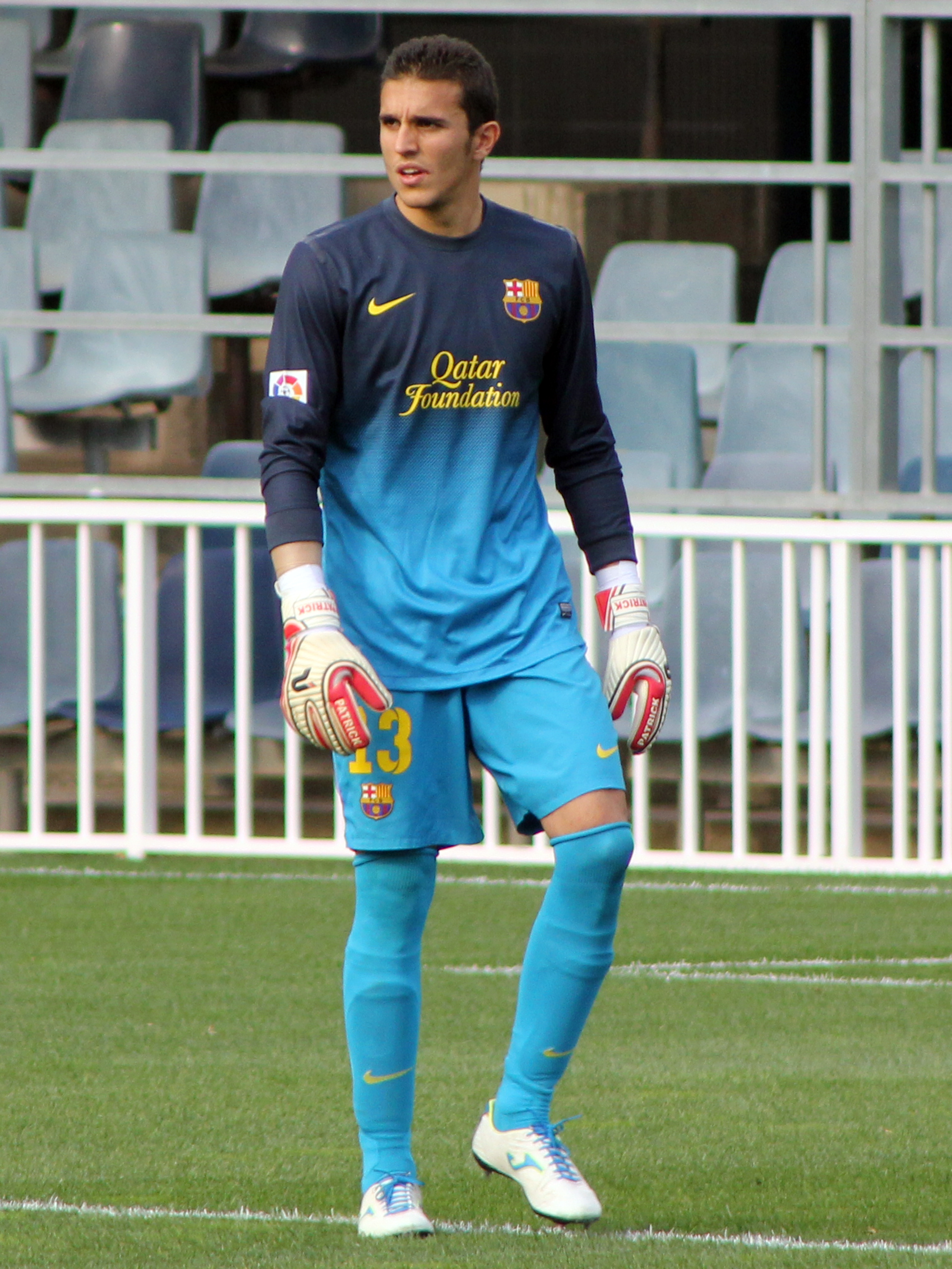 Jugador del FCB B en la temporada 2012-2013